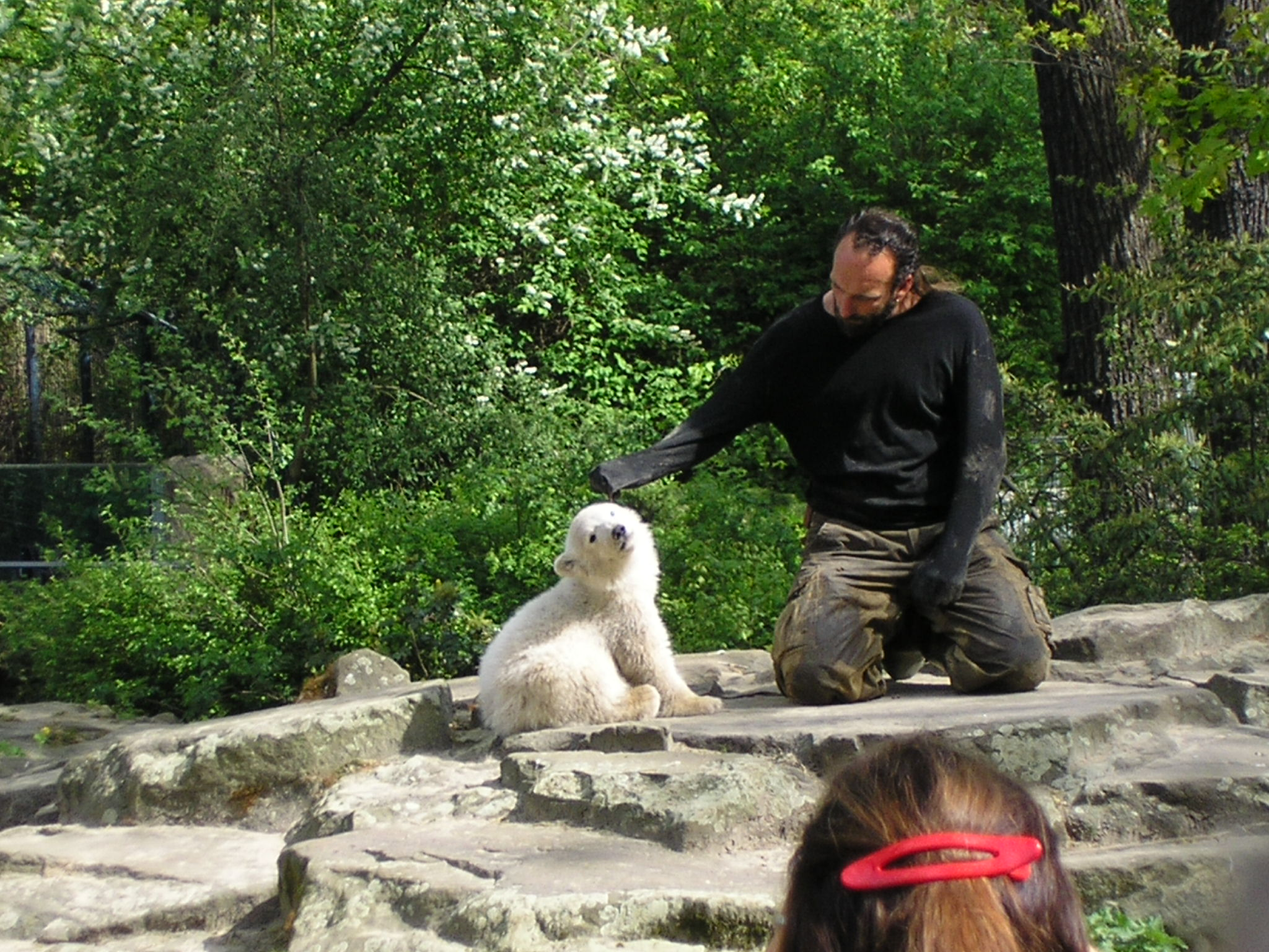 Knut y su cuidador (Thomas Dörflein) en abril de 2007.